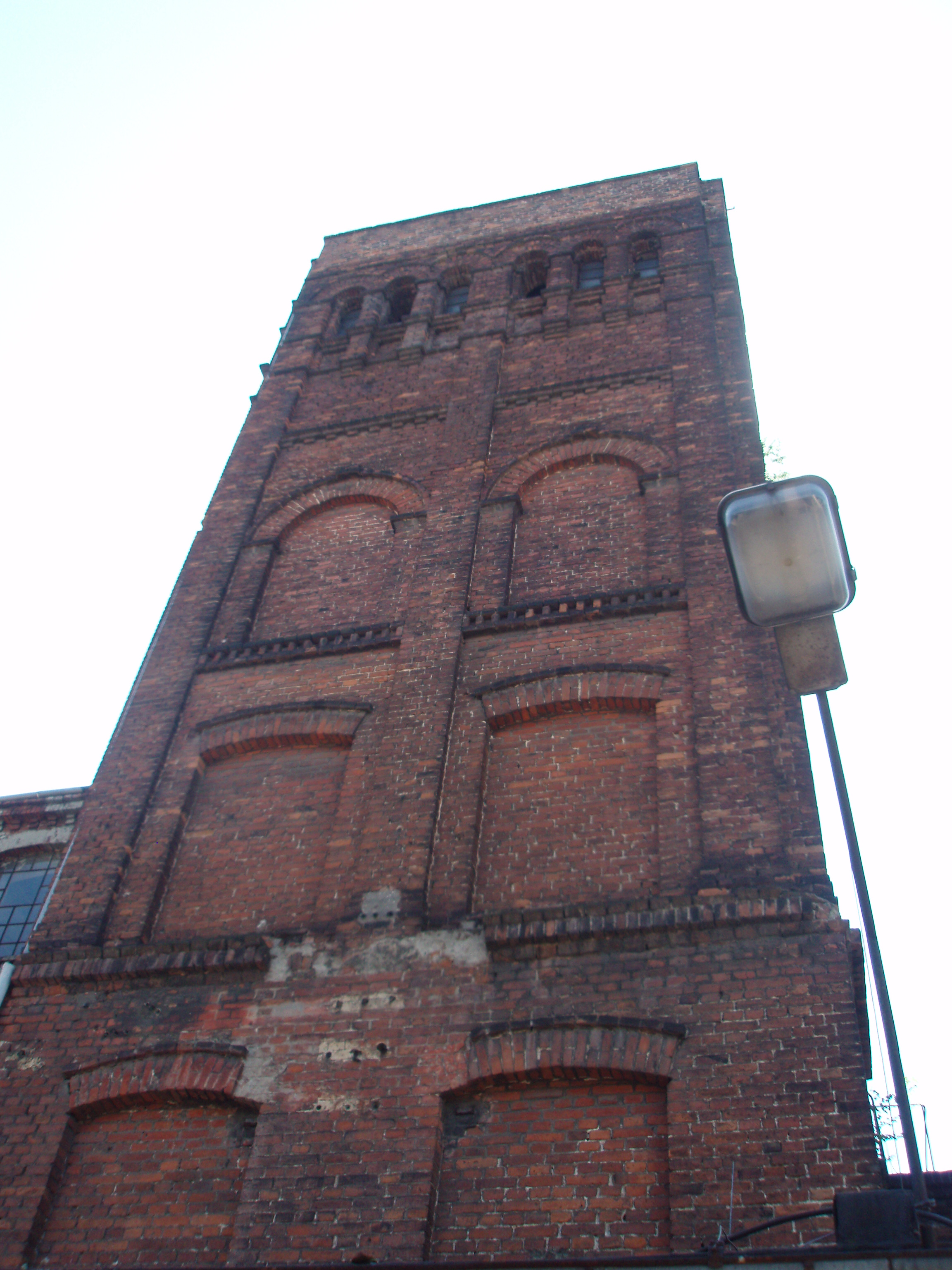 Obiekt w kompleksie przemysłowym przy ul. Rzgowskiej 26/28